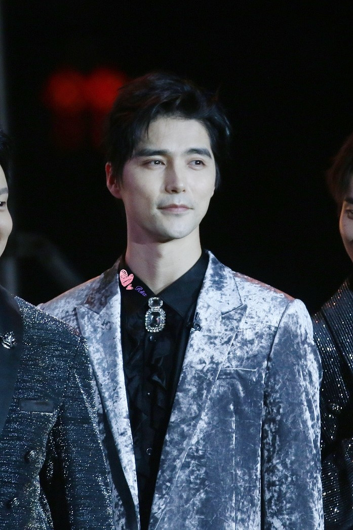 中文（中国大陆）: 2019年3月28日，声入人心男团出席《请回答，歌手》线下音乐展